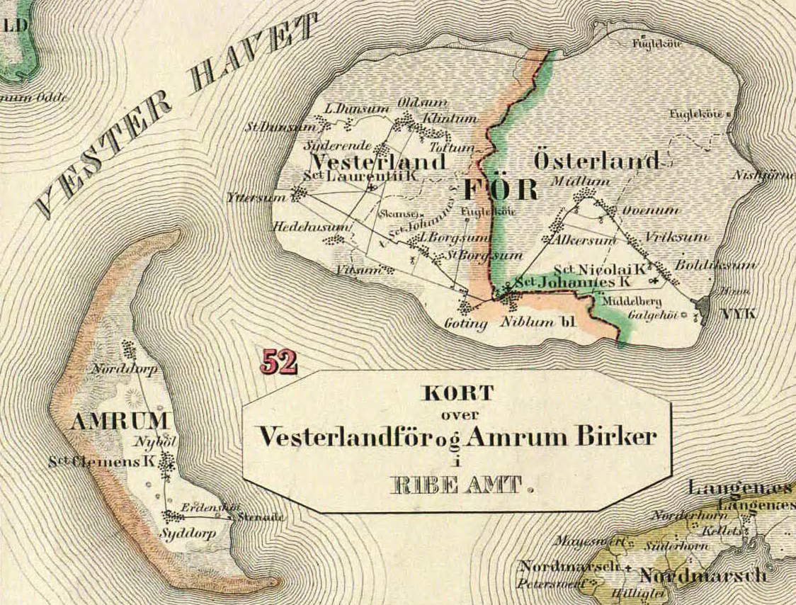 Detail fra: J. H. Mansa: Nörrejylland 1863 - Anden omarbeidede og forbedrede Udgave, 1858-1859